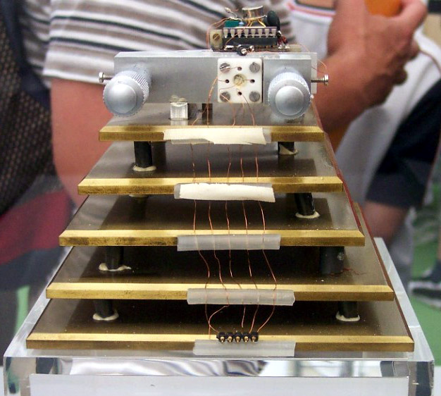 Scanning Tunneling Microscope in Schwingungs-Dämpfplatten